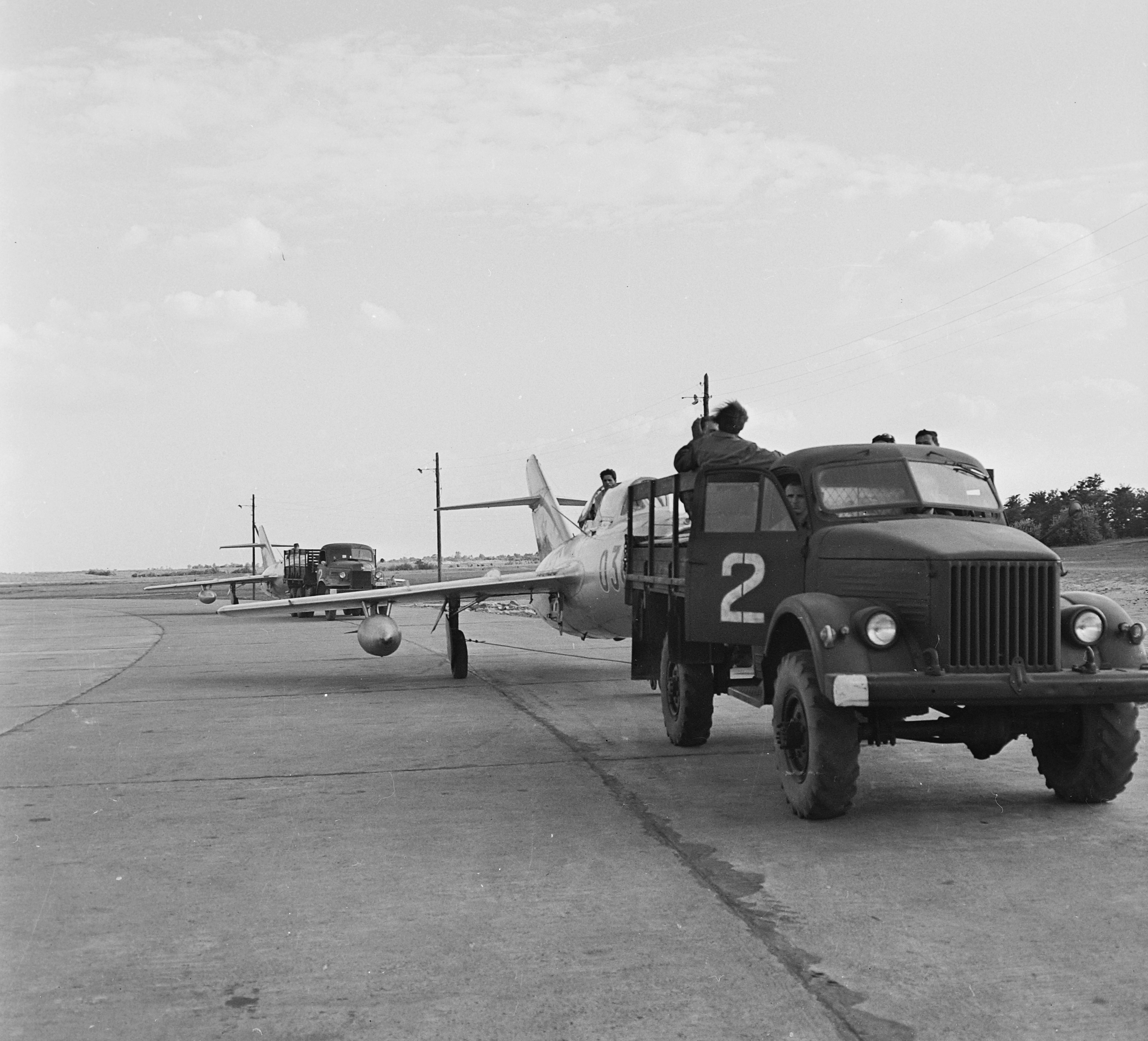 repülőtér, elől MiG-15UTI, mögötte MiG-15bisz vadászrepülőgépet vontatnak. Location: Hungary, Szolnok Tags: military, GAZ-brand, fighter;plane, airplane, airport, transport, Hungarian air force, Soviet brand Title: repülőtér, elől MiG-15UTI, mögötte MiG-15bisz vadászrepülőgépet vontatnak.